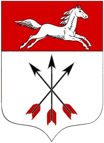 Герб міста Чигирин